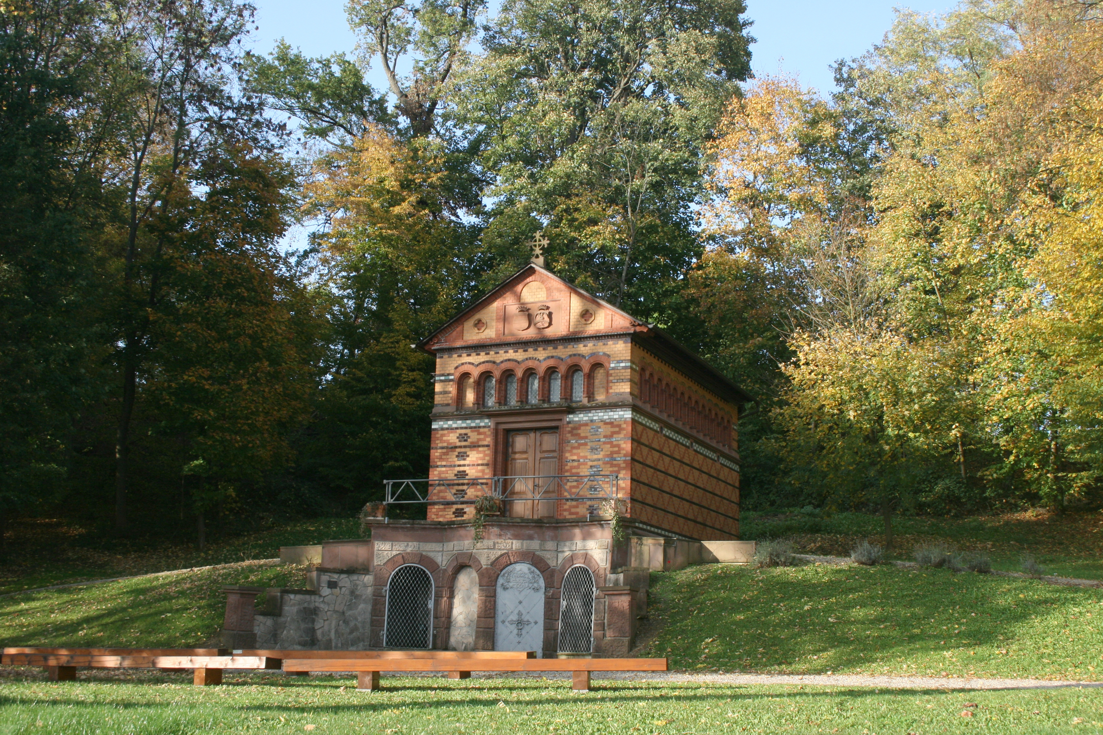 Mausoelum von Gemmingen, gen. Sarolta-Kapelle, in Fränkisch-Crumbach (Odenwald), 1892 erbaut nach Entwurf des Mainzer Dombaumeisters Joseph Lukas